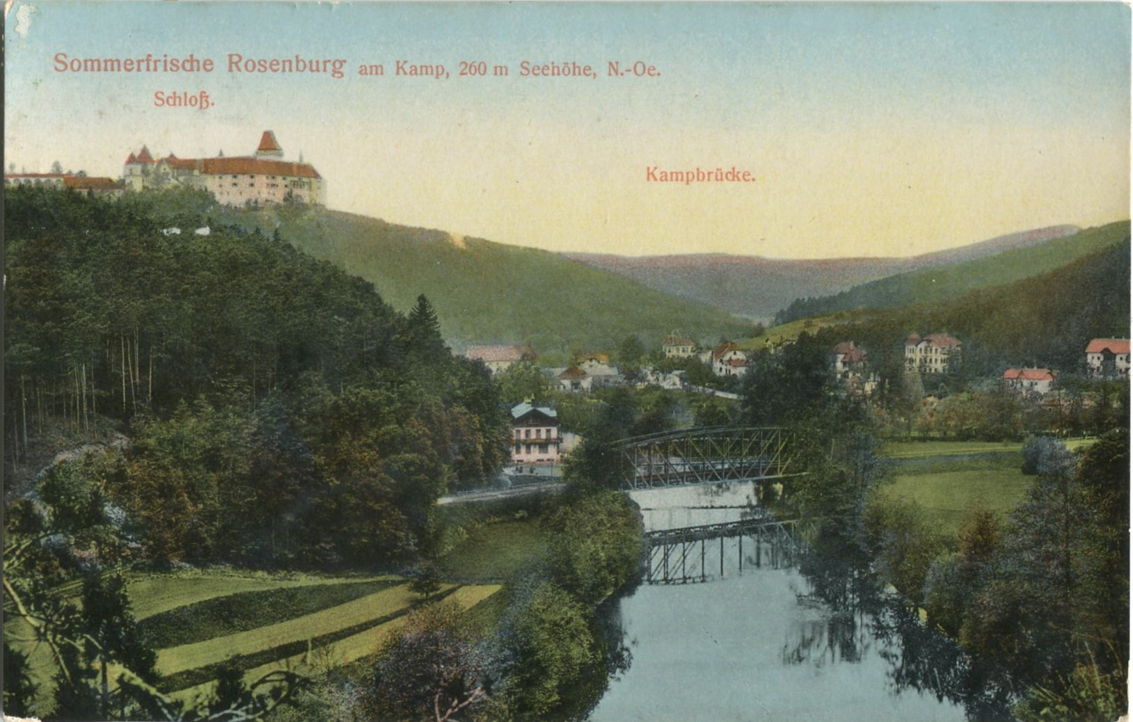 Blick auf Rosenburg, um 1910